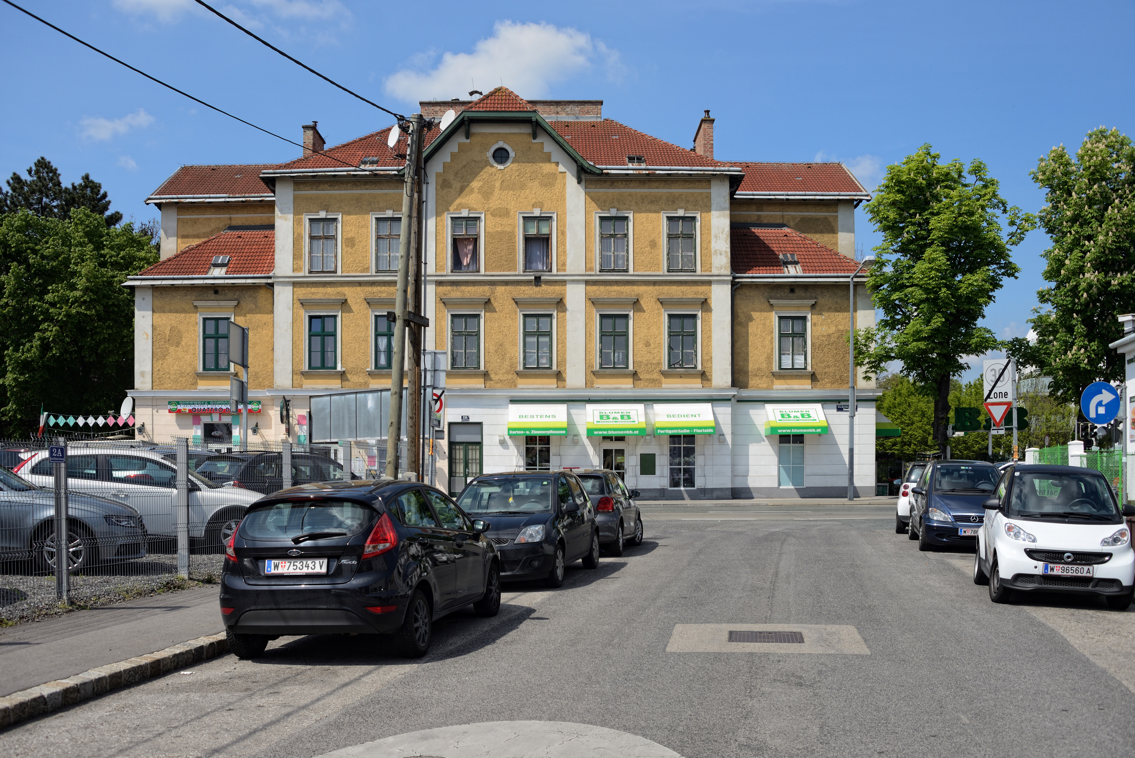 Haus, Breitenfurter Strasse 116